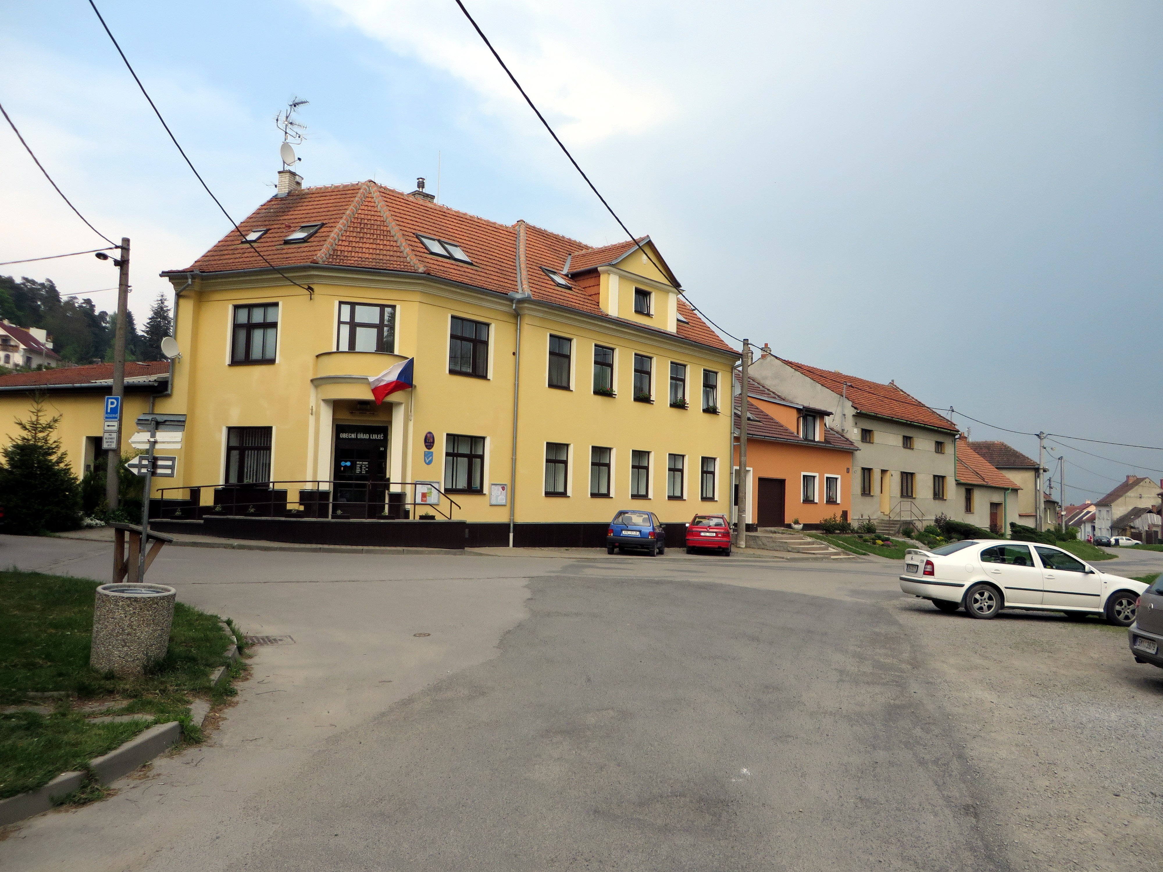 Luleč, náves s OÚ